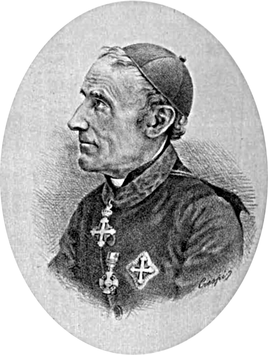 Ritratto di Giovanni Spano